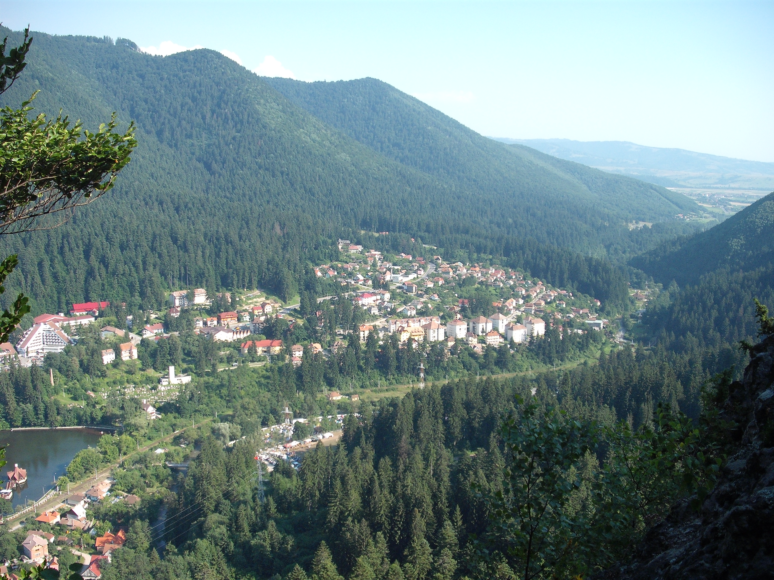 tusnádfürdö 3